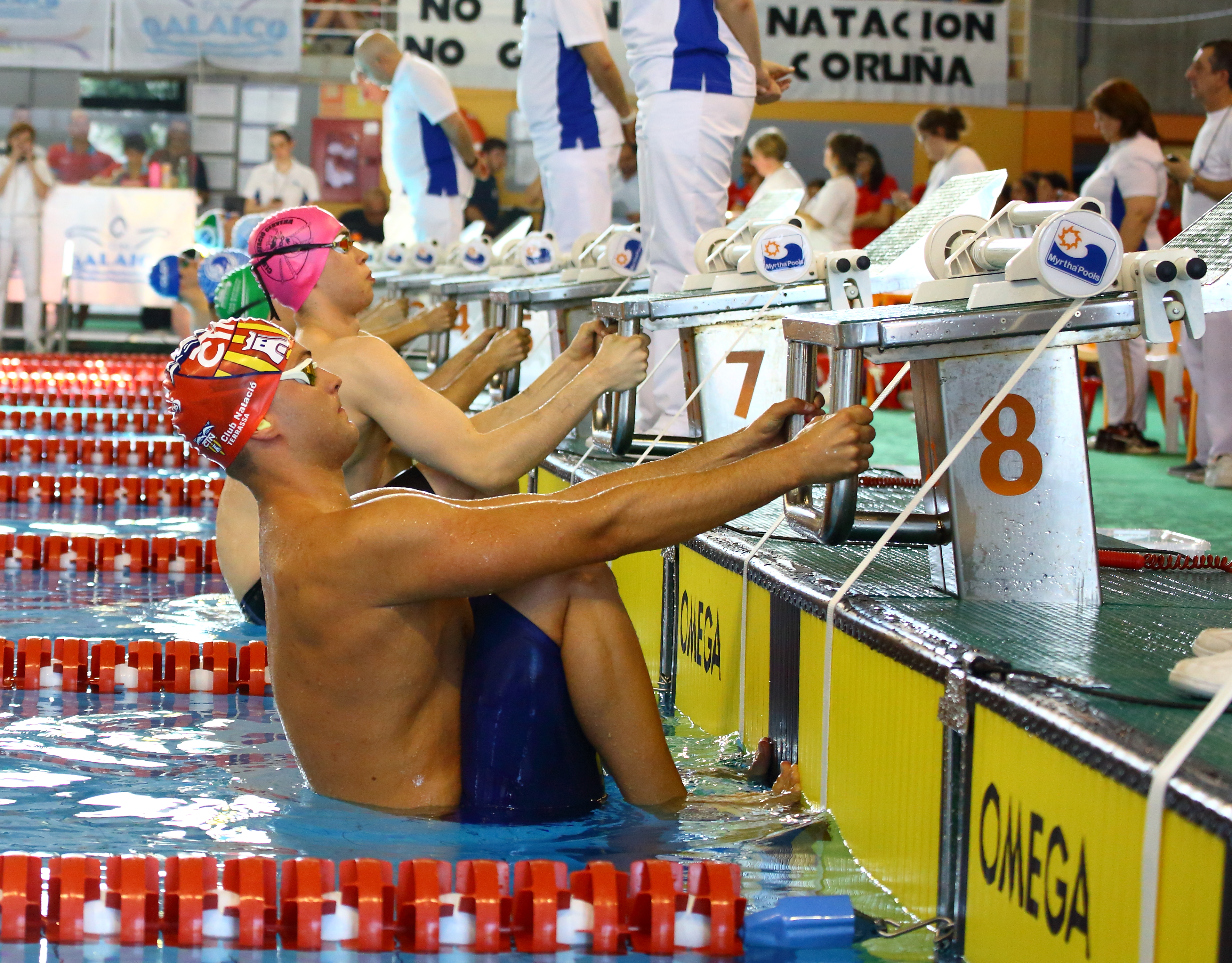 Sistema Myrtha en el Campeonato de España Absoluto Open de Primavera de 2017